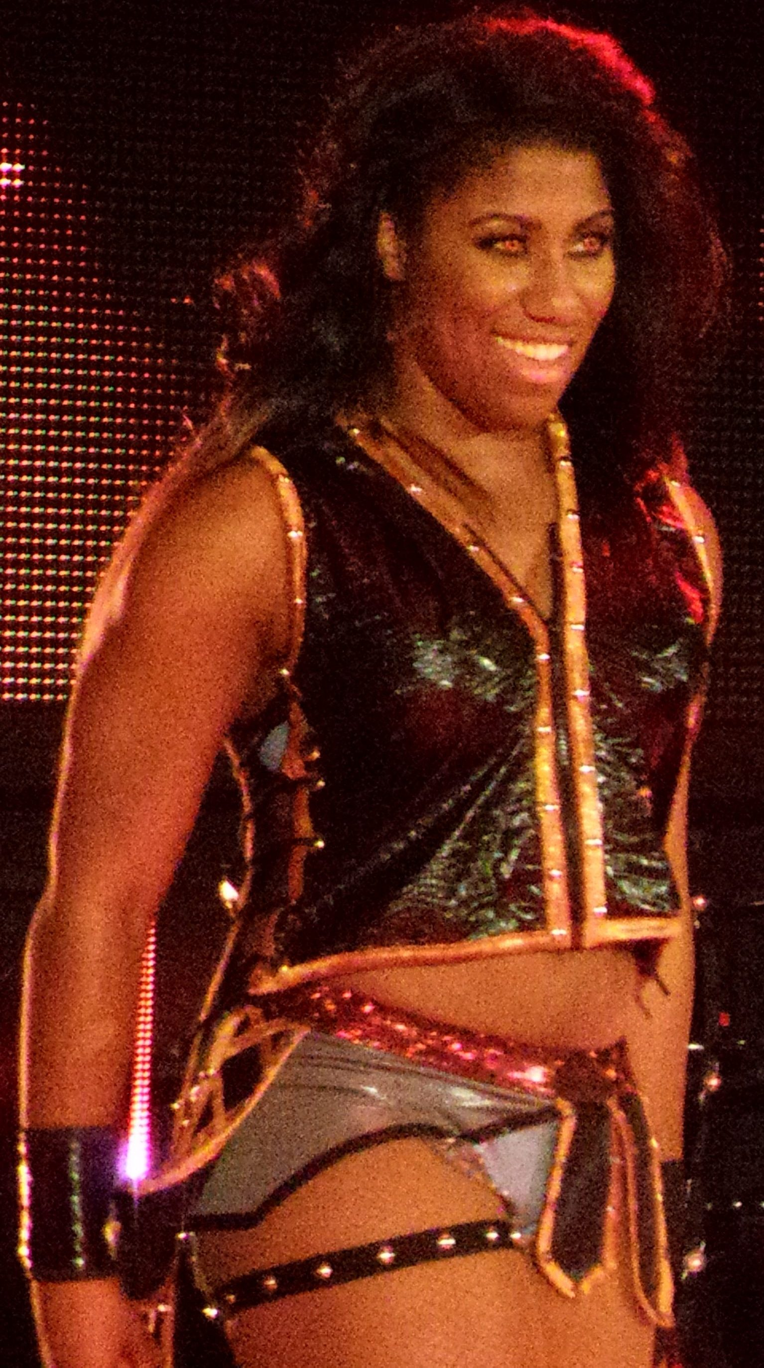 P_20170105_201002_002